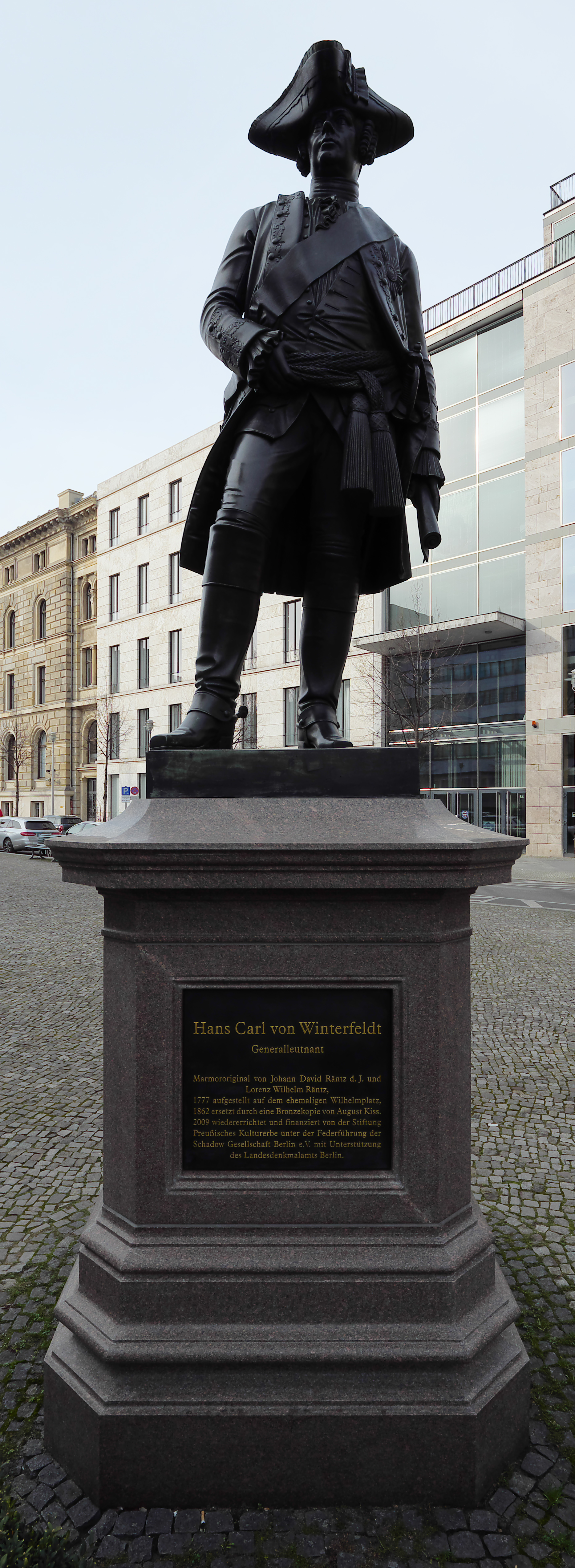 Denkmal von Hans Carl von WInterfeldt auf dem Zietenplatz in Berlin-Mitte